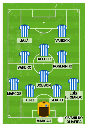 a real escalação do paysandu em 2002